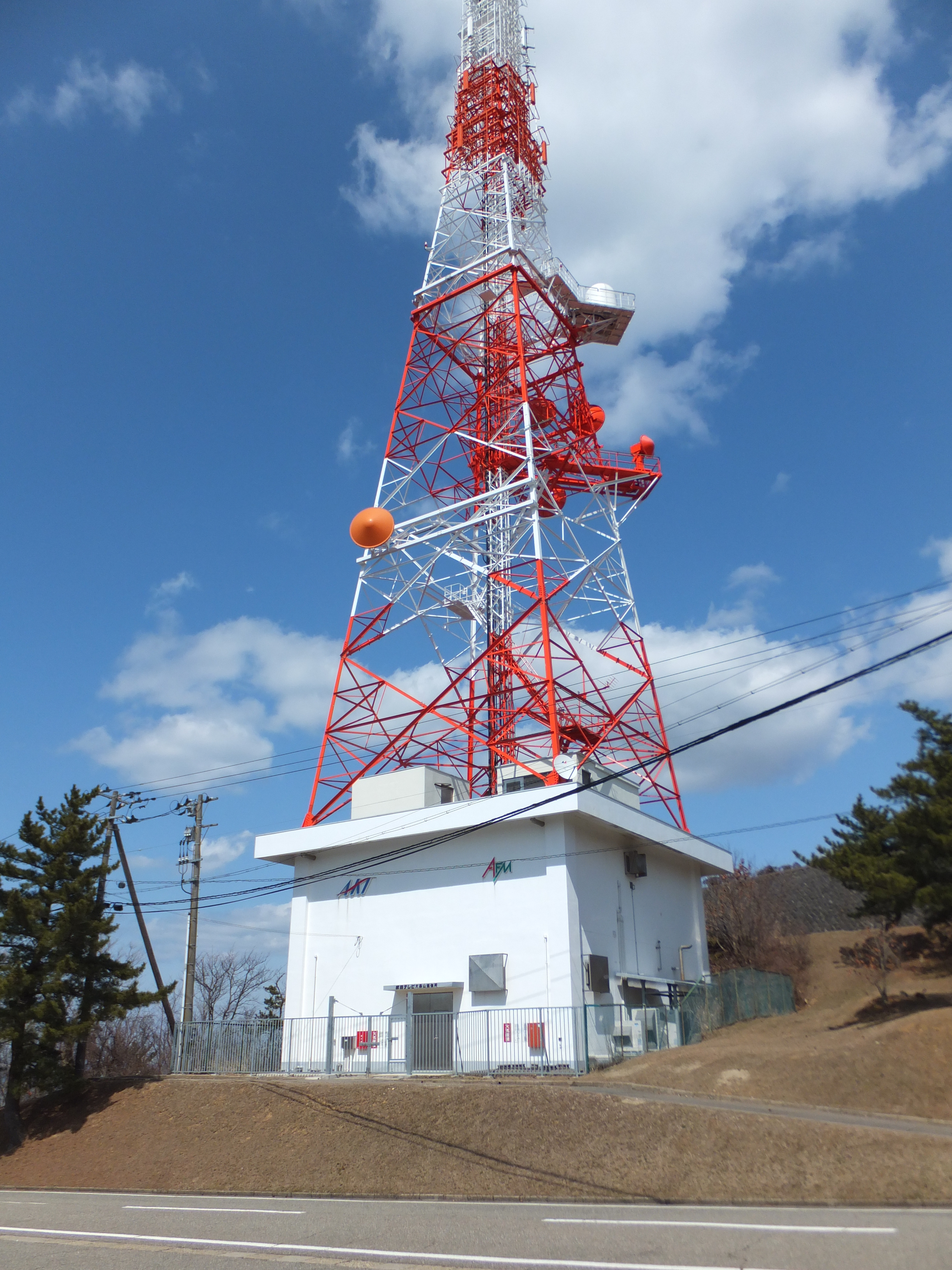 秋田テレビ・FM秋田大森山送信所